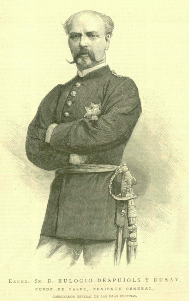 Excmo. Sr. D. Eulogio Despujols y Dusay, Conde de Caspe, Teniente General, Gobernador General de las Islas Filipinas.